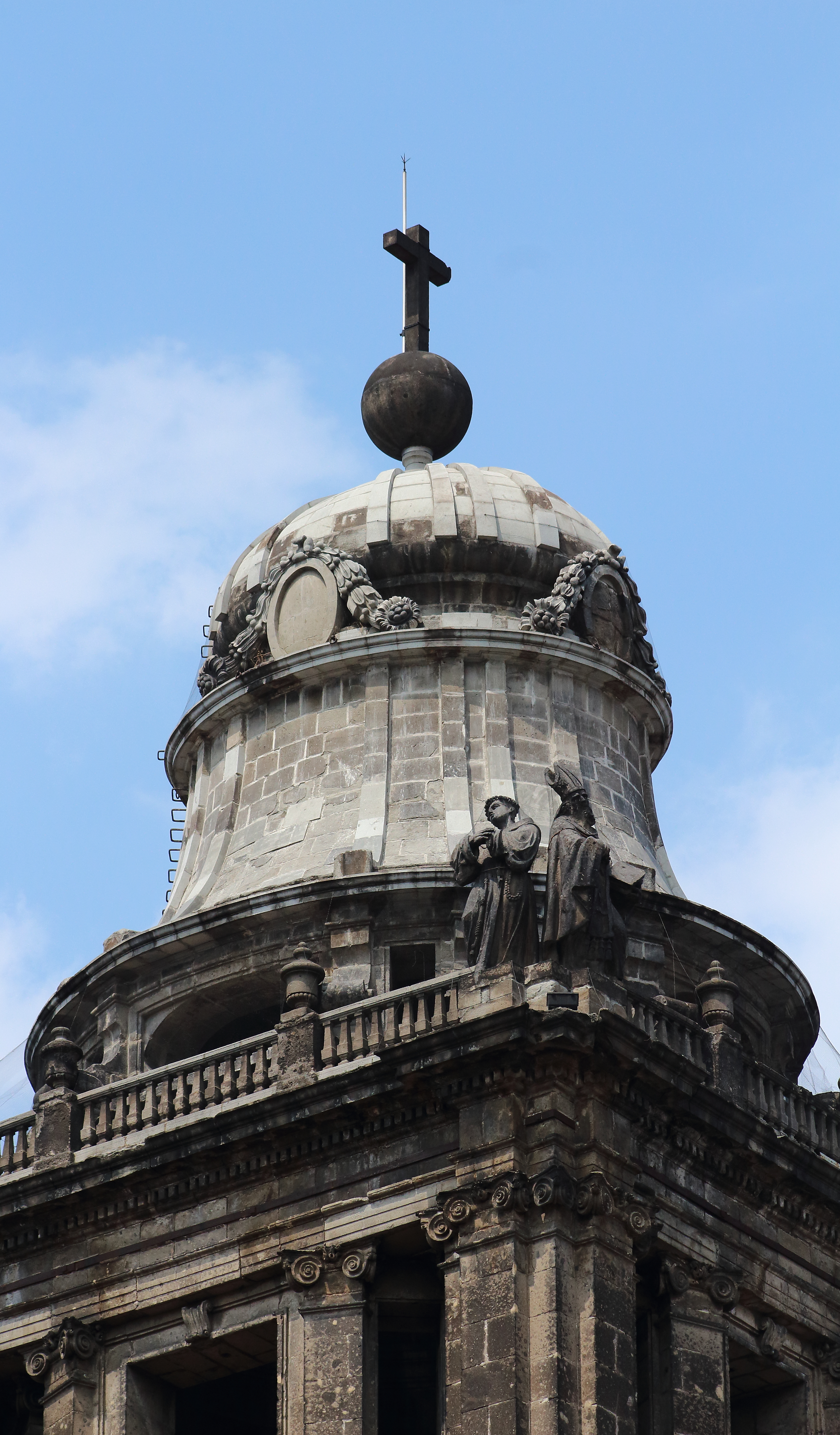 Campanario de la Catedral en la Ciudad de México